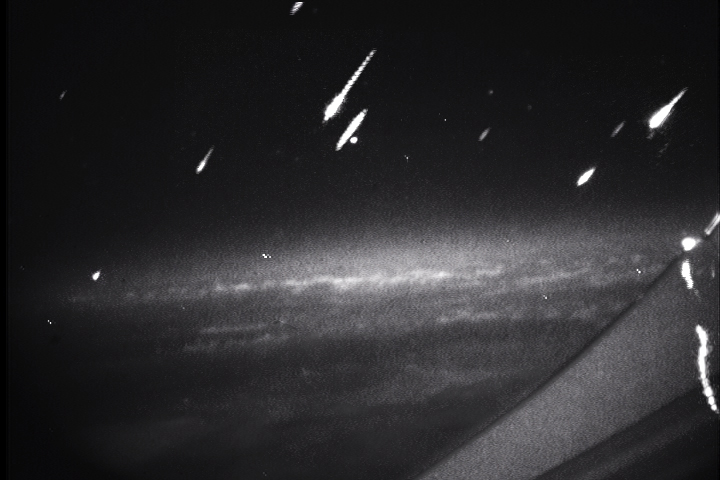 метеорски дожд ауригиди 2007